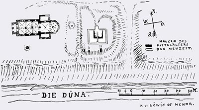 Ikšķiles baznīcas un pilsdrupu plāns 1910. gadā